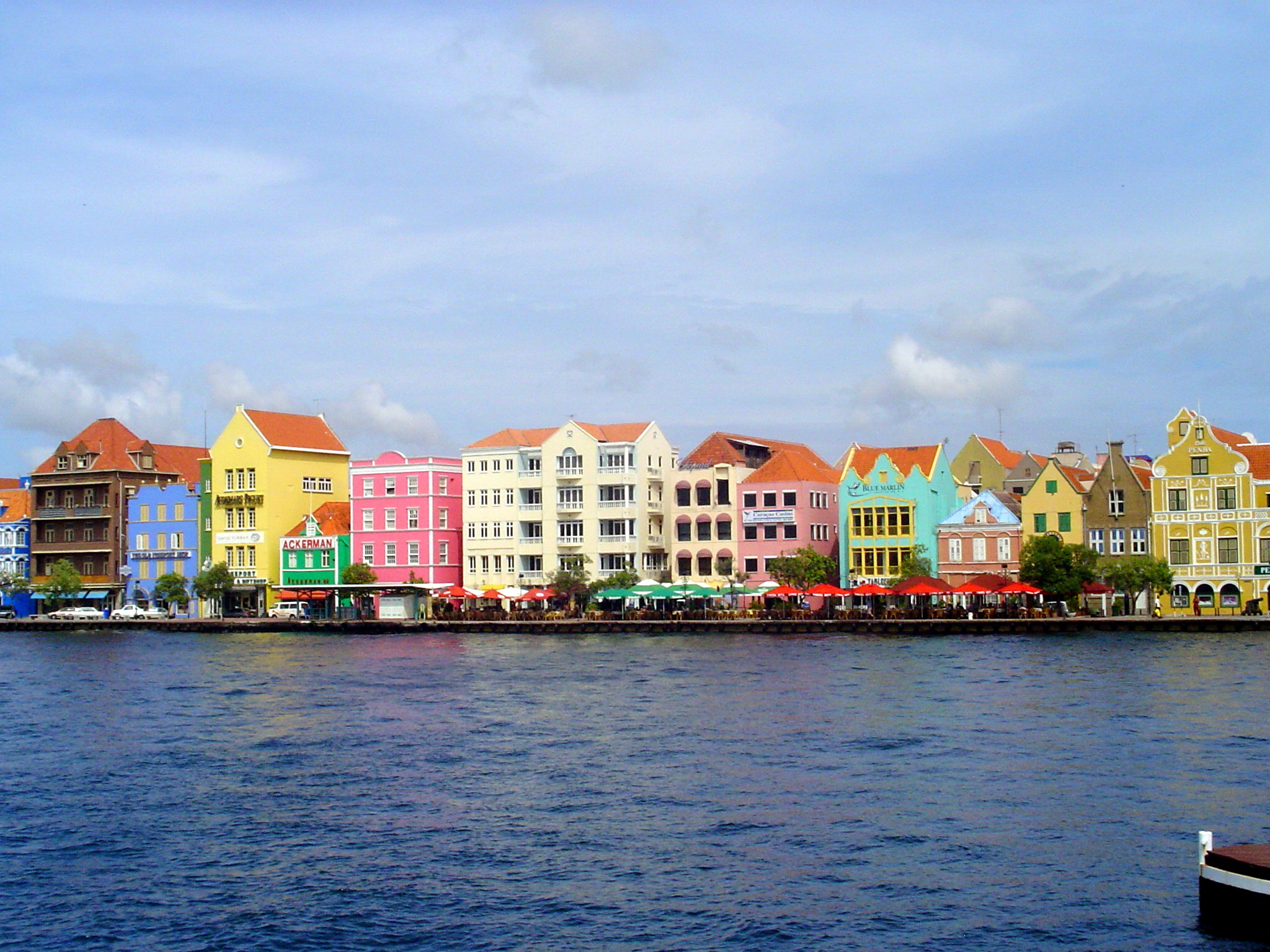 Deze foto heb ik in 2004 gemaakt toen ik op vakantie was op Curaçao. -C.R.R.